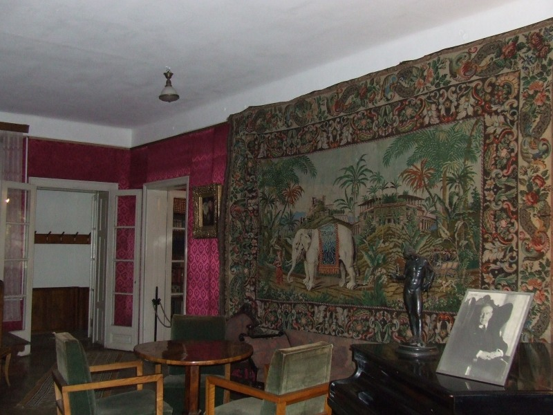 Ciucea castle, Cluj County, Romania